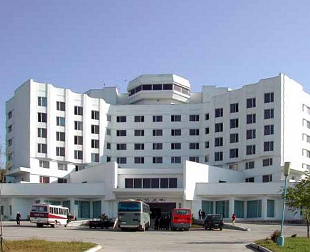 Rajin Hotel in Rason, DPRK. Taken in September 2003.